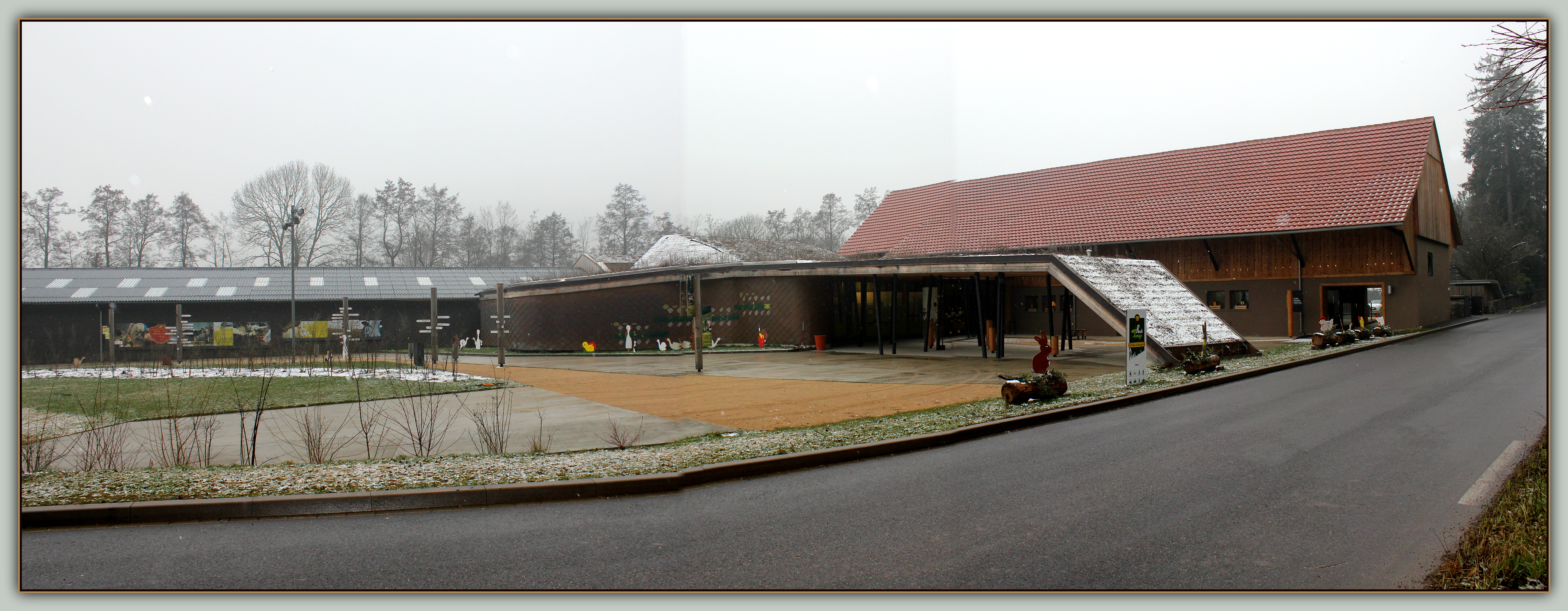 Maison du Fromage 23 route de Munster 68140 Gunsbach